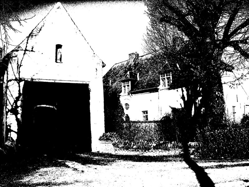 Schaliënhof te Vichte (België)